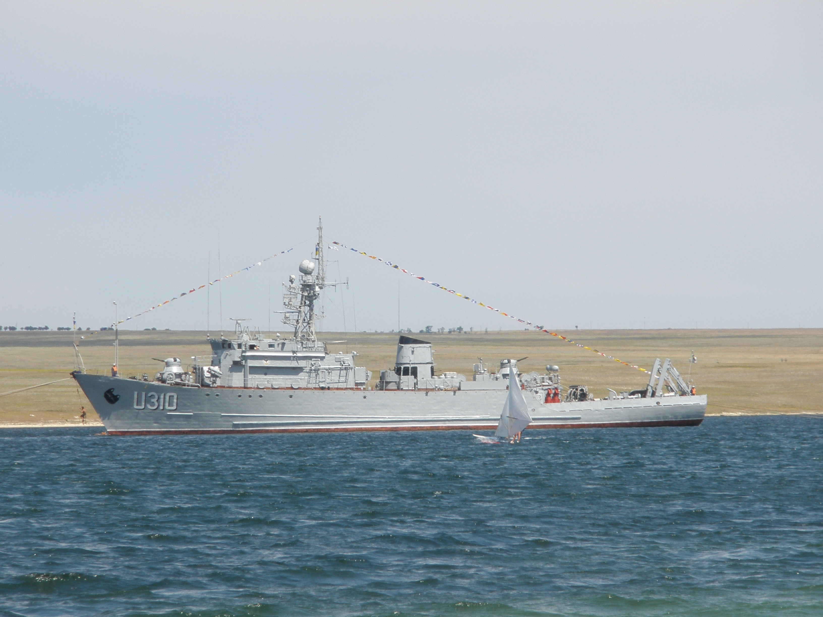 Чернигов (U310)